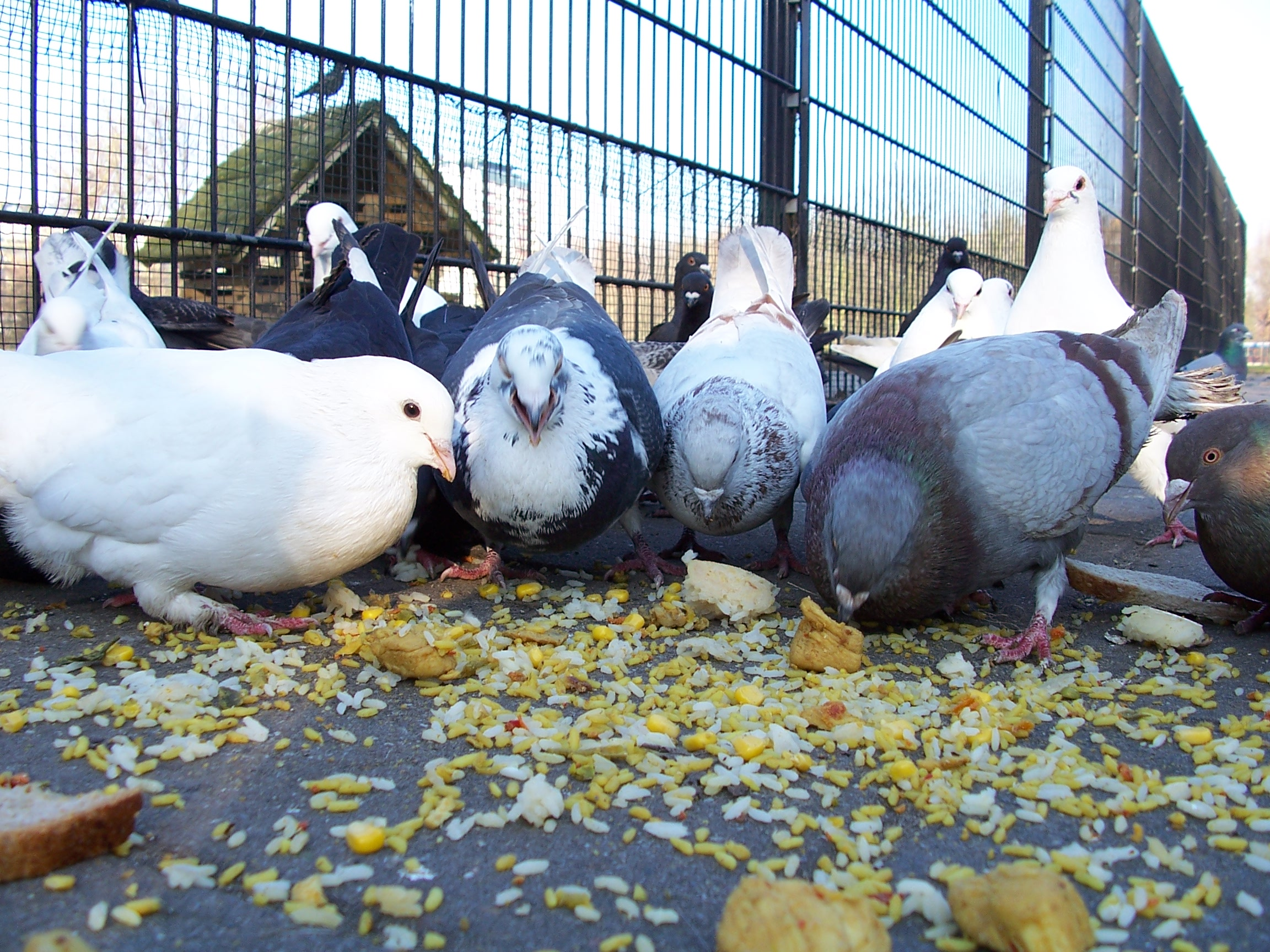 Duiven die rijst eten.